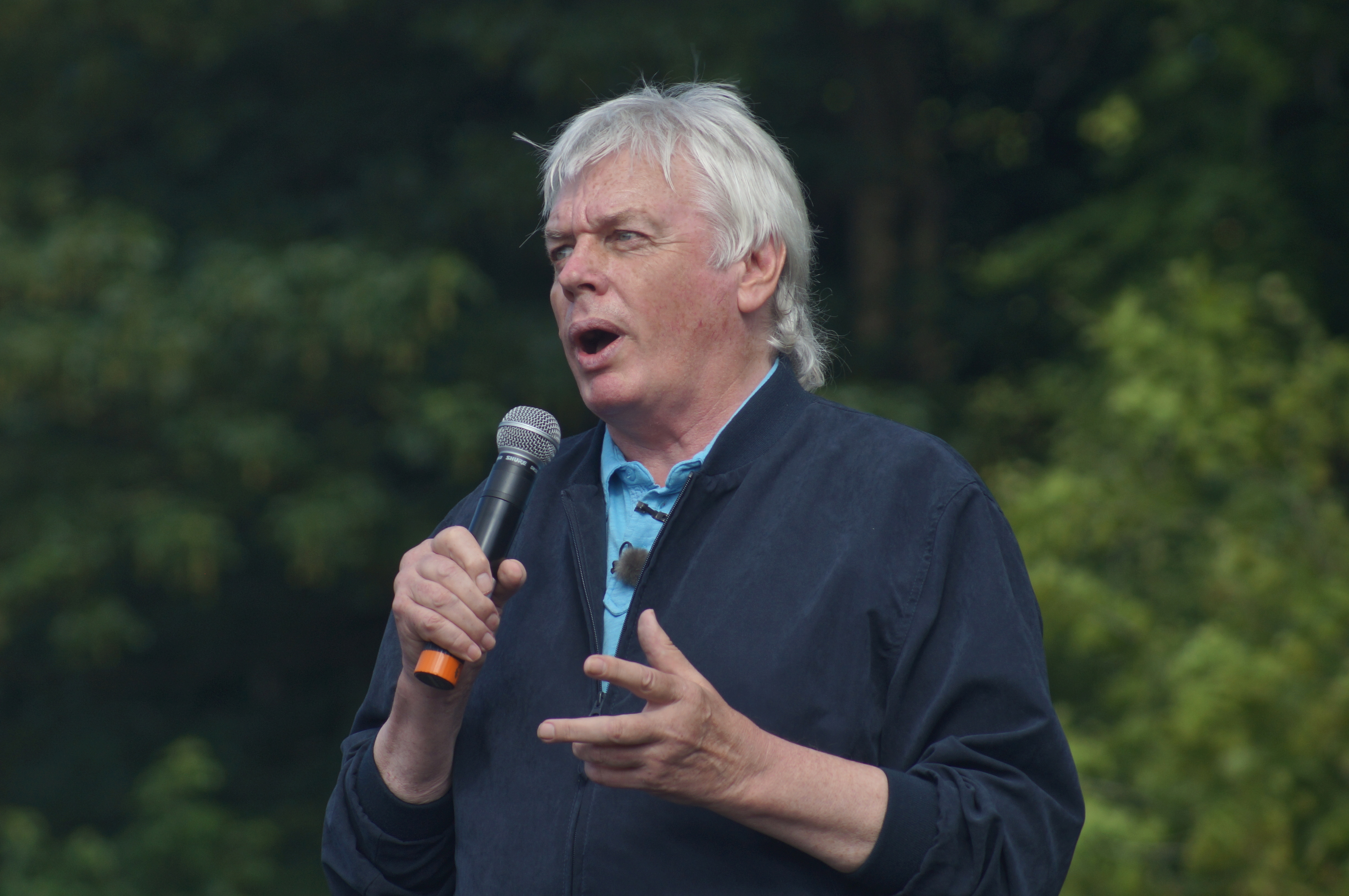 Дэвид Айк в 2013 году